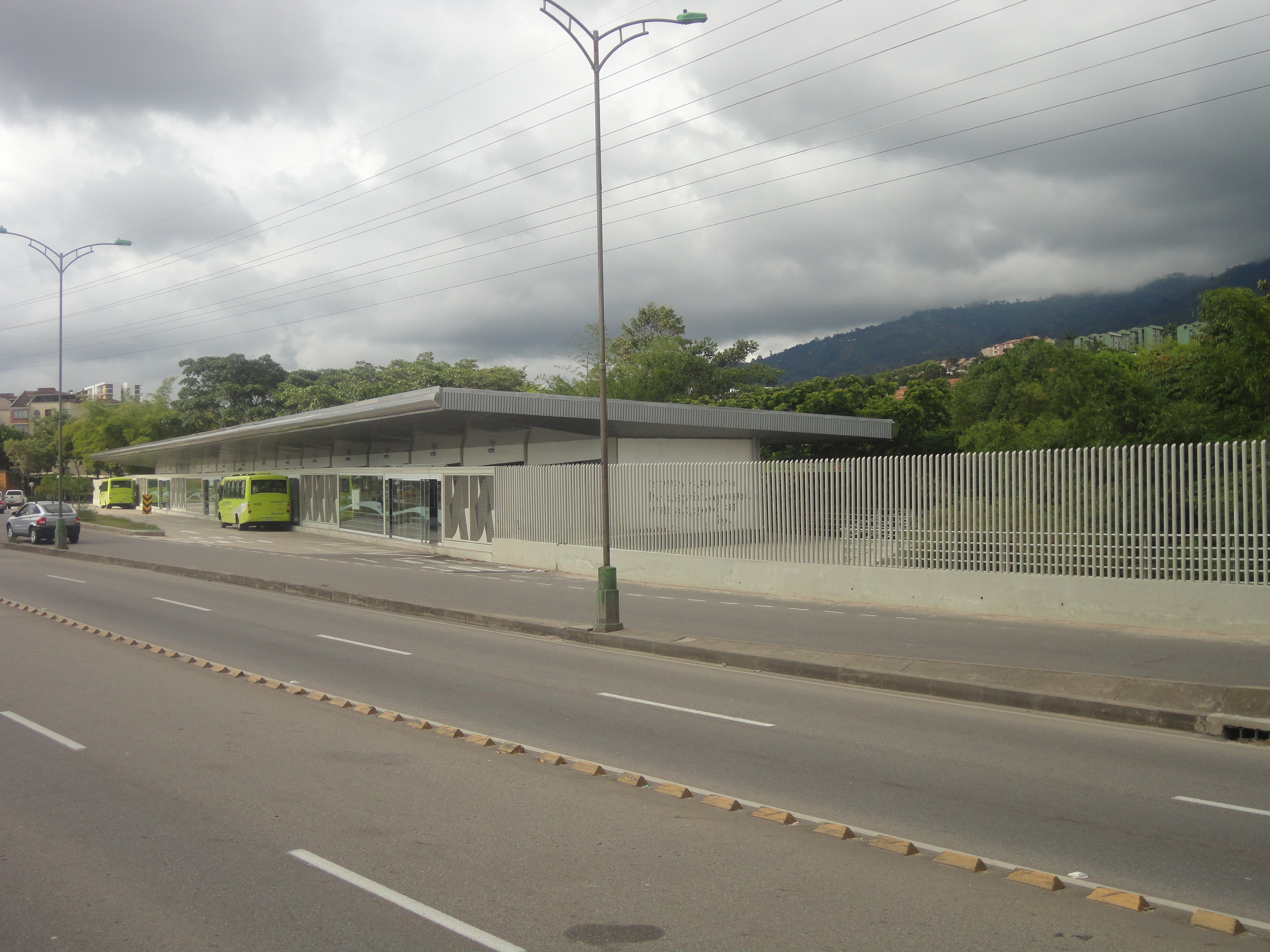 Estación Metrolínea Provenza Oriental.